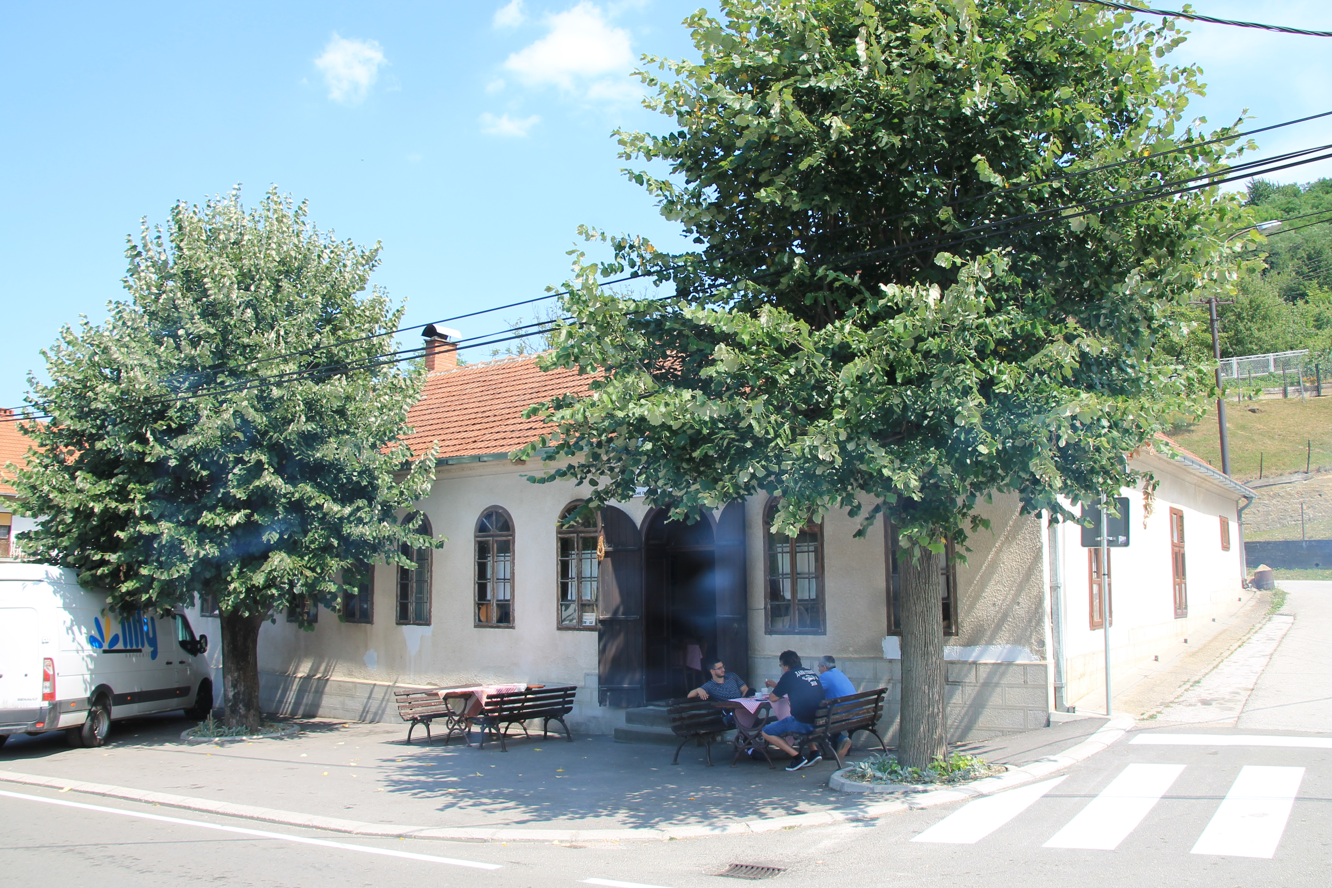 Jarmenovci